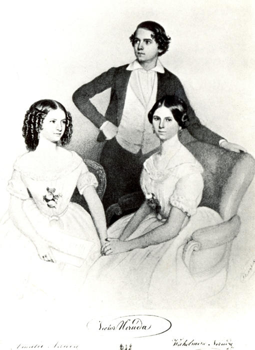 Rodina Josefa Nerudy, varhaníka u sv. Petra (zleva Amálie Nerudová, Viktor Neruda a Vilemína Nerudová). Litografie z r. 1850. Zdroj: AMB, fond U5 - sbírka fotografií, sign. XVIIIa1387 (heslo: Wilma Norman-Neruda (Lady Hallé) (1838-1911) a Amálie Wickenhauserová (Nerudová))